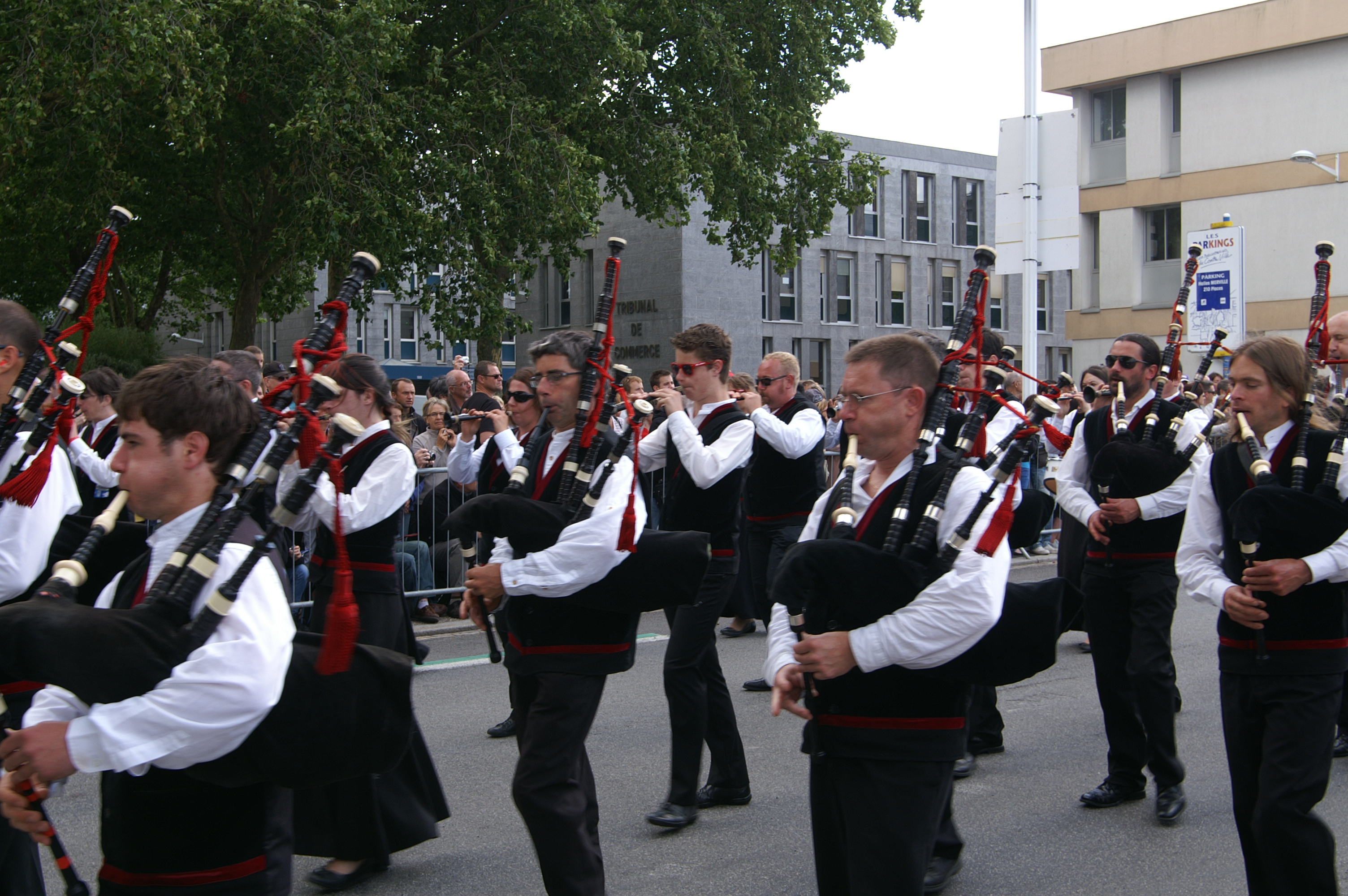 Le bagad Gwengamp, Festival interceltique de Lorient 2011.